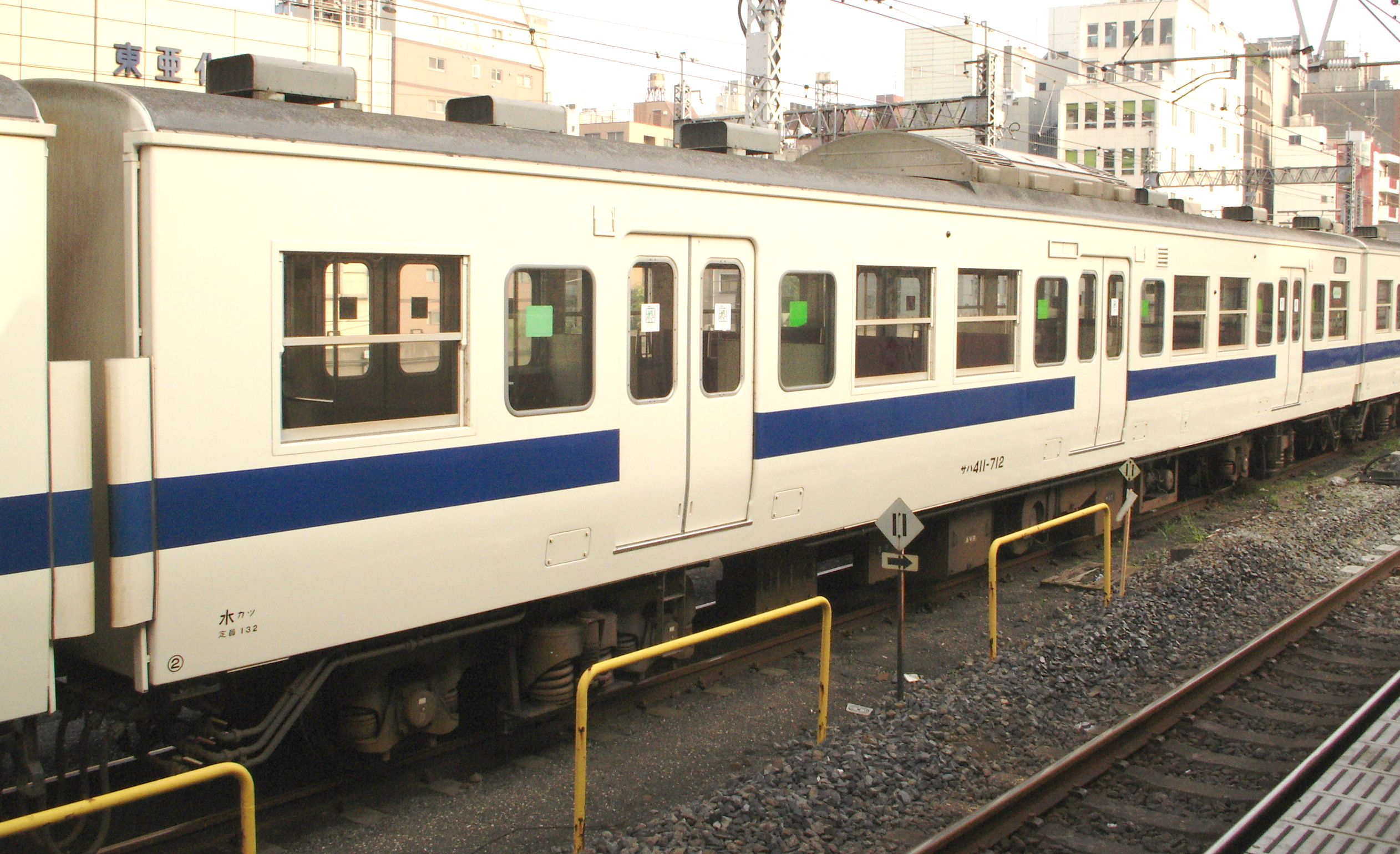 東日本旅客鉄道415系近郊形交直流電車 サハ411-712